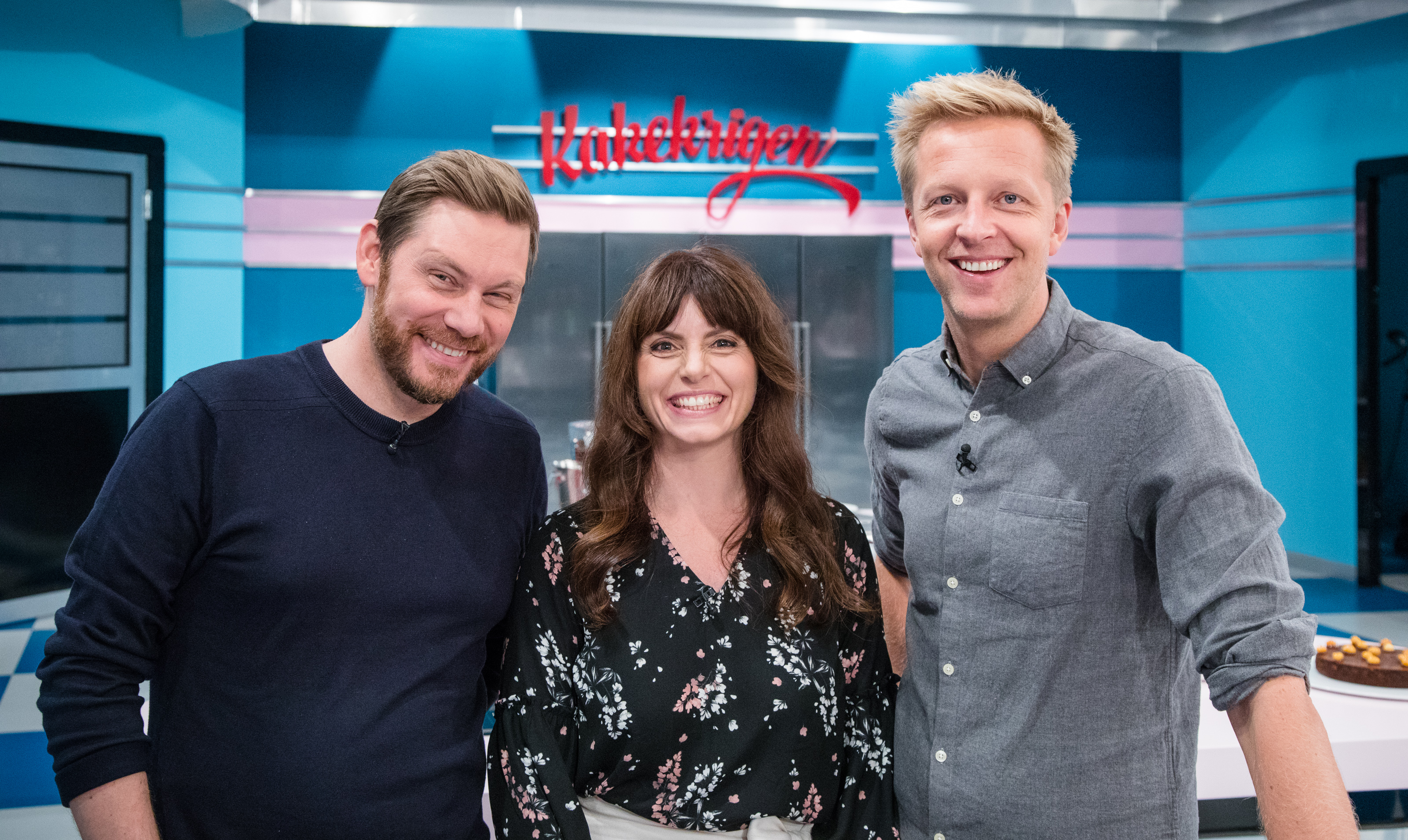 Bilde fra Kakekrigen sesong 7